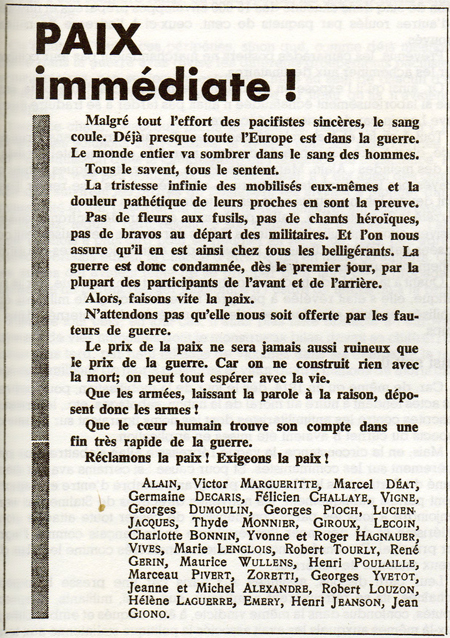 Le 13 septembre 1939, dix jours après l'entrée en guerre de la France, l'anarchiste Louis Lecoin diffuse à 100 000 exemplaires un tract intitulé "Paix immédiate" qu'il a fait signé à 30 personnalités.